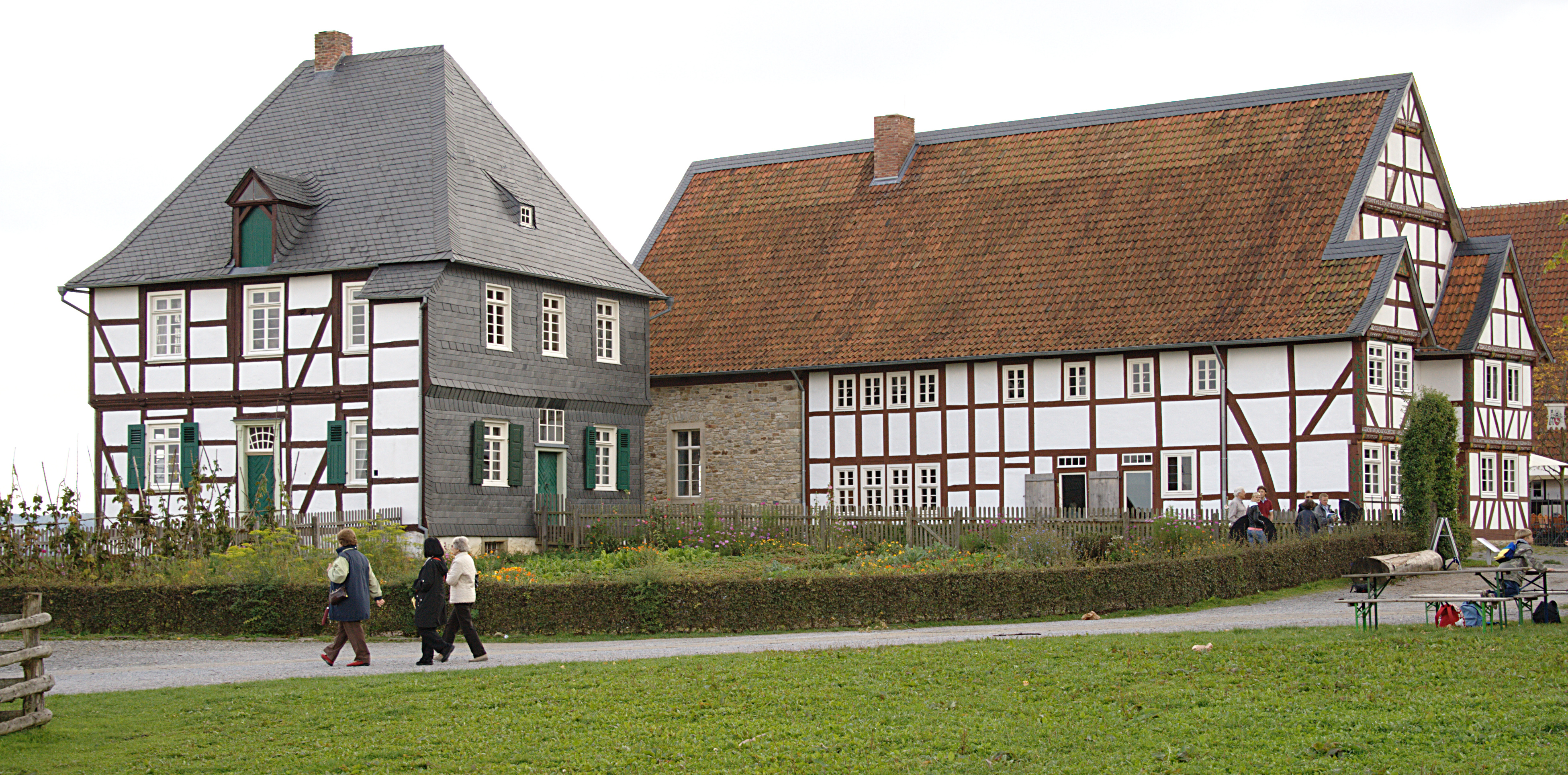 Westfälisches Freilichtmuseum Detmold